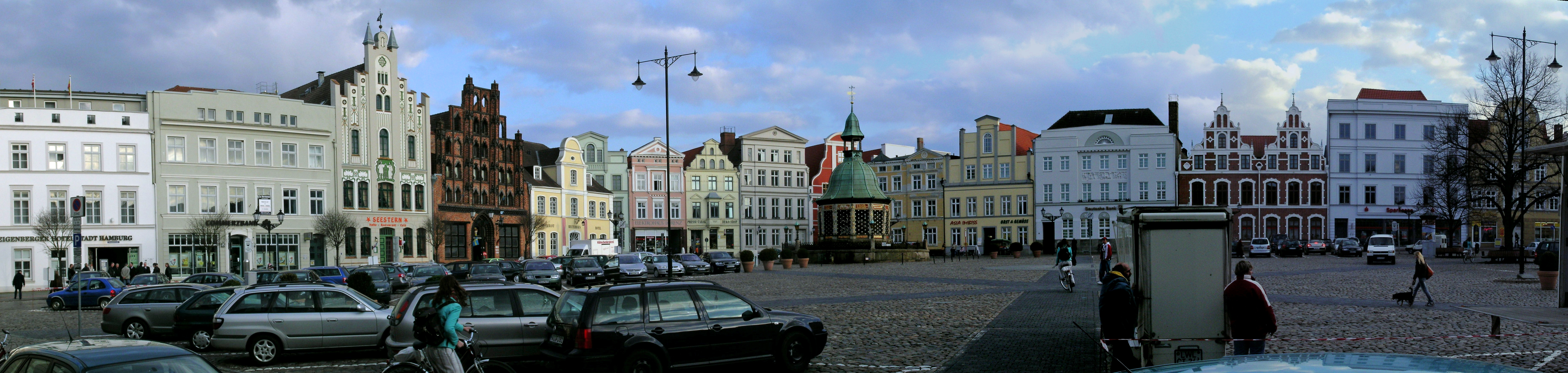 Panoramabild Martkplatz Wismar (Germany)